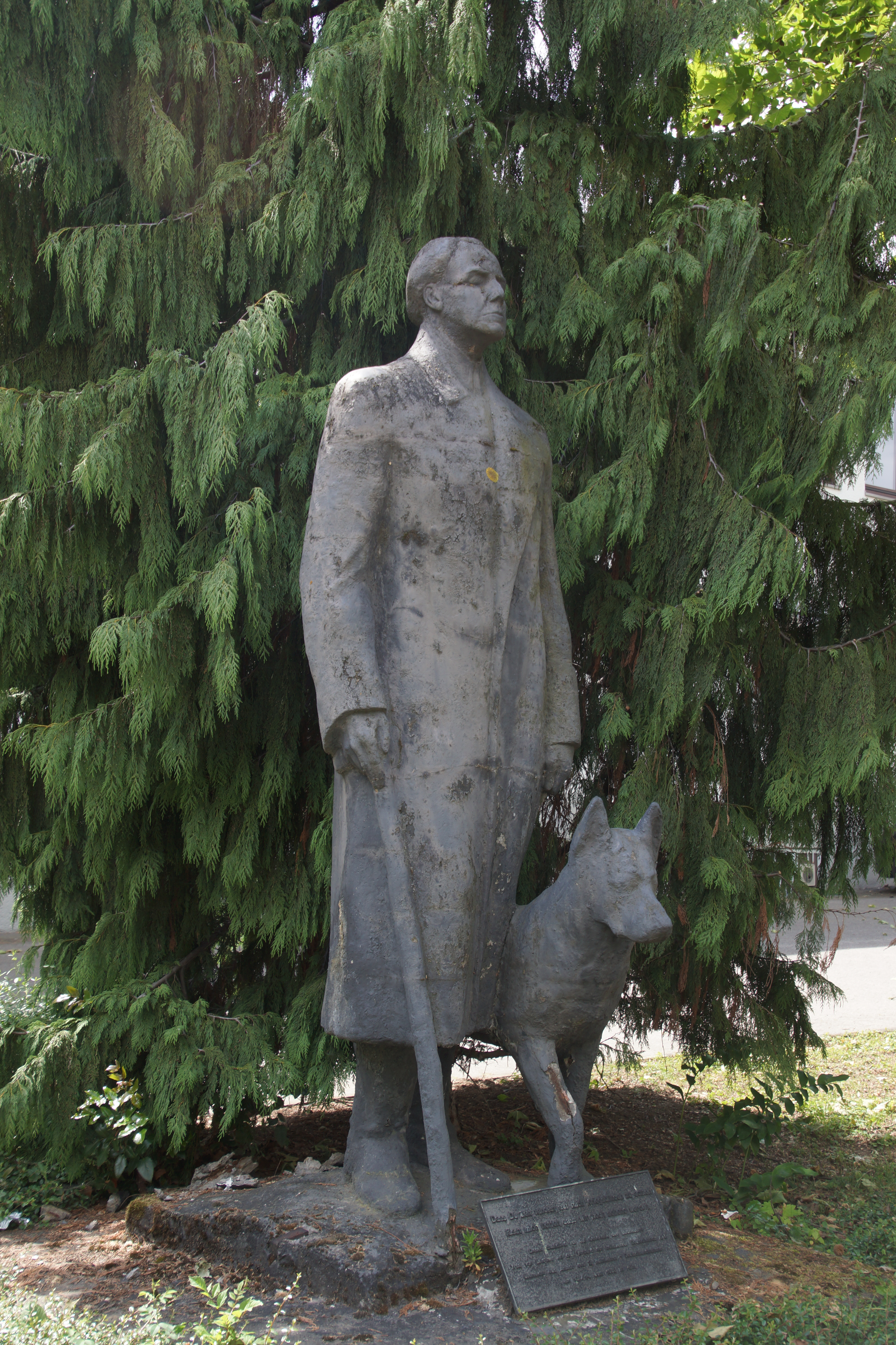 Statue Kriegsblinden-Denkmal in Bonn-Mehlem, Mainzer Straße. Beschriftung der Plakette: Dass du Zeit fandest, auf mich Kriegsblinden zu achten, lässt mich hoffen, dass wir noch sehend werden. Dieses Standbild ist ein Geschenk der Bildhauerin Yrsa von Leister an den Verband der Heimkehrer e. V. überreicht aus Anlass des dritten Heimkehrer-Deutschlandtreffens am 13./14. Juni 1959 in Köln.